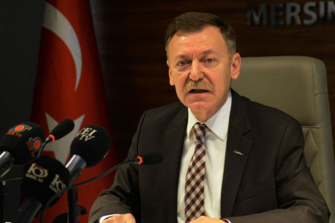 Aytuğ Atıcı'nın CHP Genel Başkan Aday Adaylığını açıklarken çekilen bir fotoğrafı.